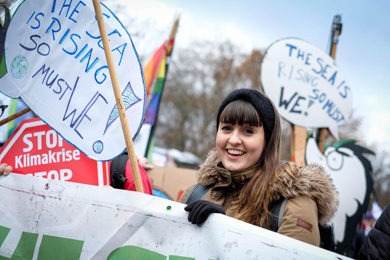 Auf diesem Bild zu sehen ist Anna Peters, Bundessprecherin der Grünen Jugend, auf dem Klimastreik in Berlin am 29.11.2019